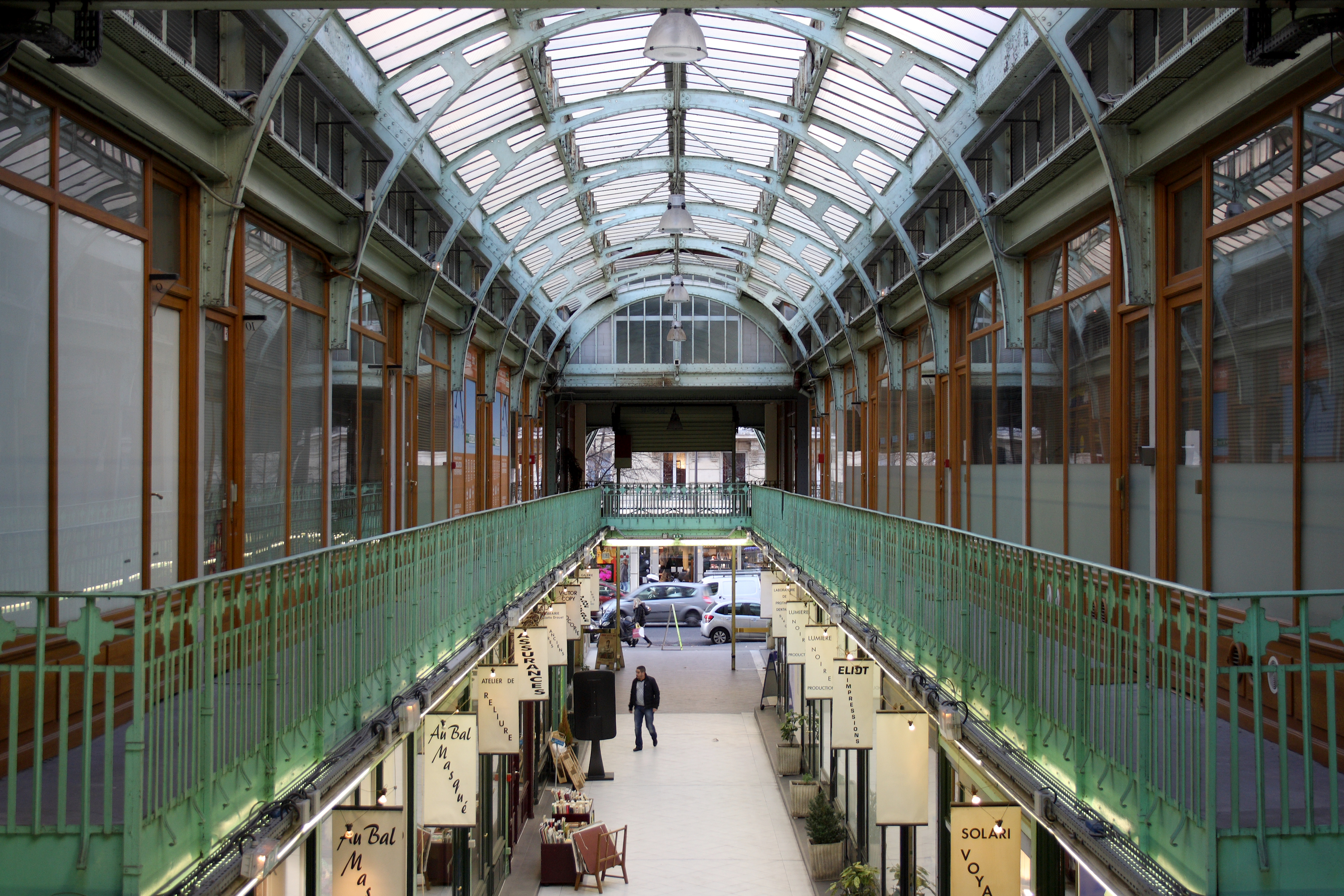 Cité de l'Argentine, 111, avenue Victor Hugo im 16. Arrondissement von Paris, Mietshaus und Einkaufspassage von Henri Sauvage von 1907